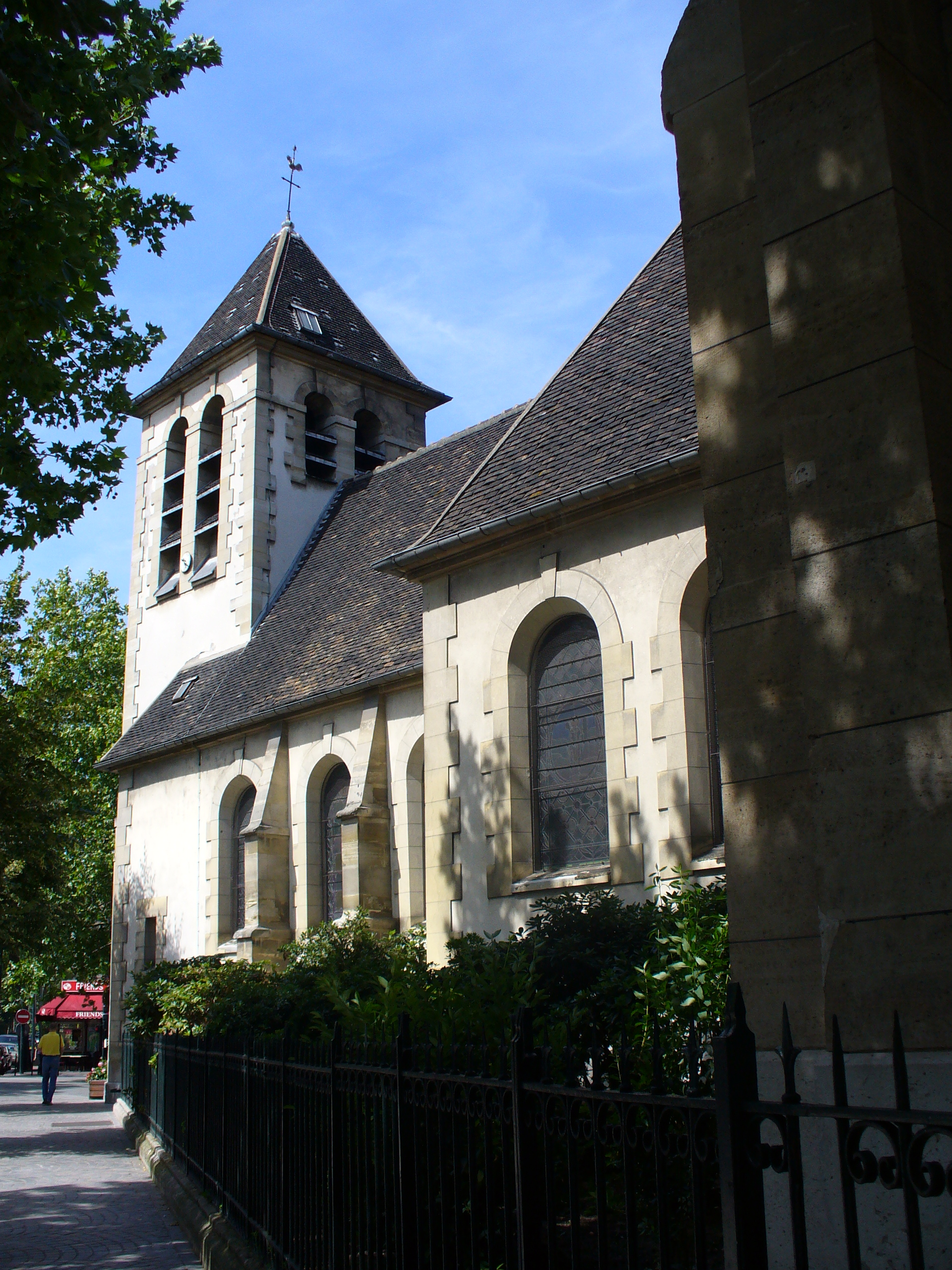 Eglise Saint-Vincent de Paul à Clichy (Hauts-de Seine)